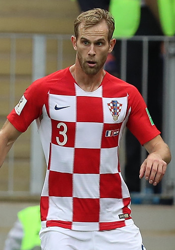 Уилл Смит, Гризманн, Модрич и кубок мира - в Москве прошёл финал ЧМ-2018